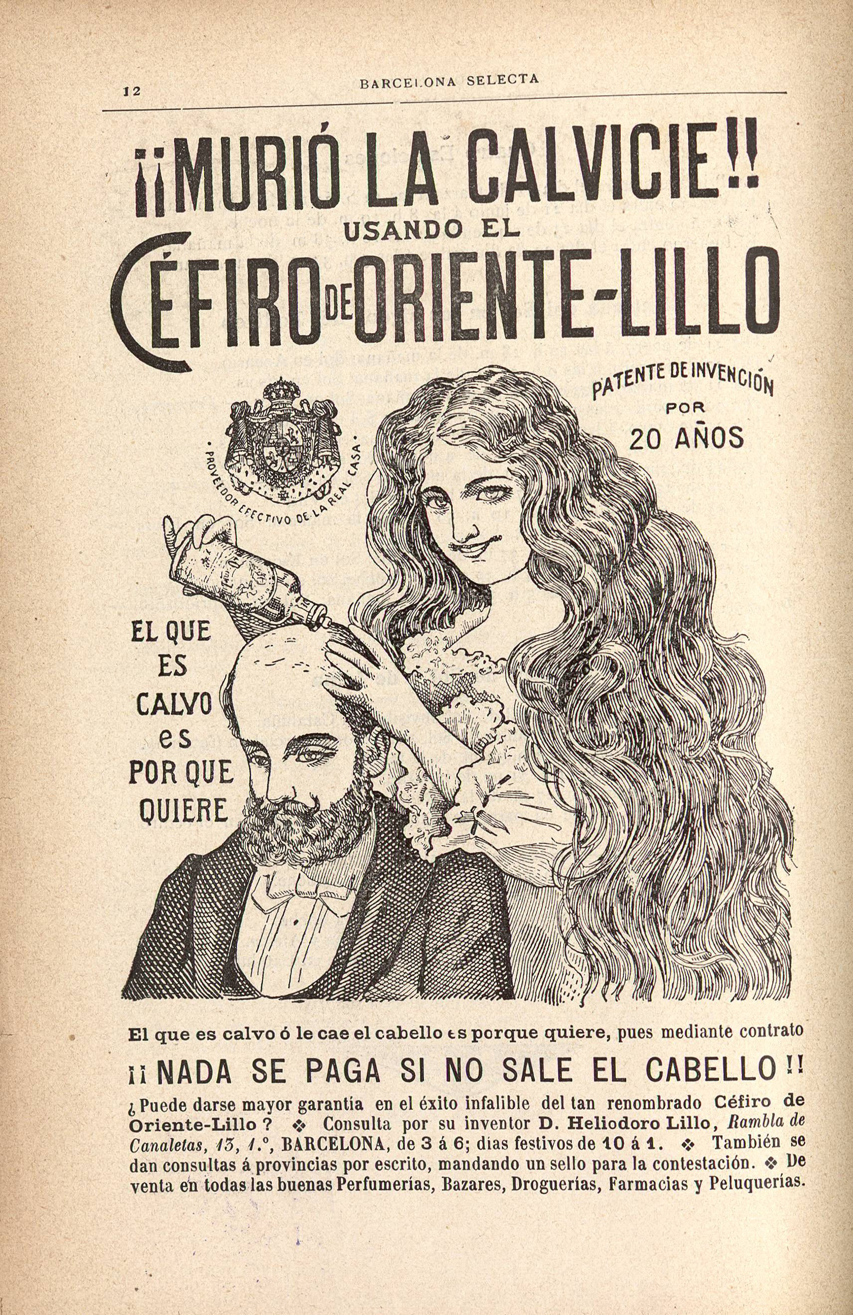 Anunci dins la publicació